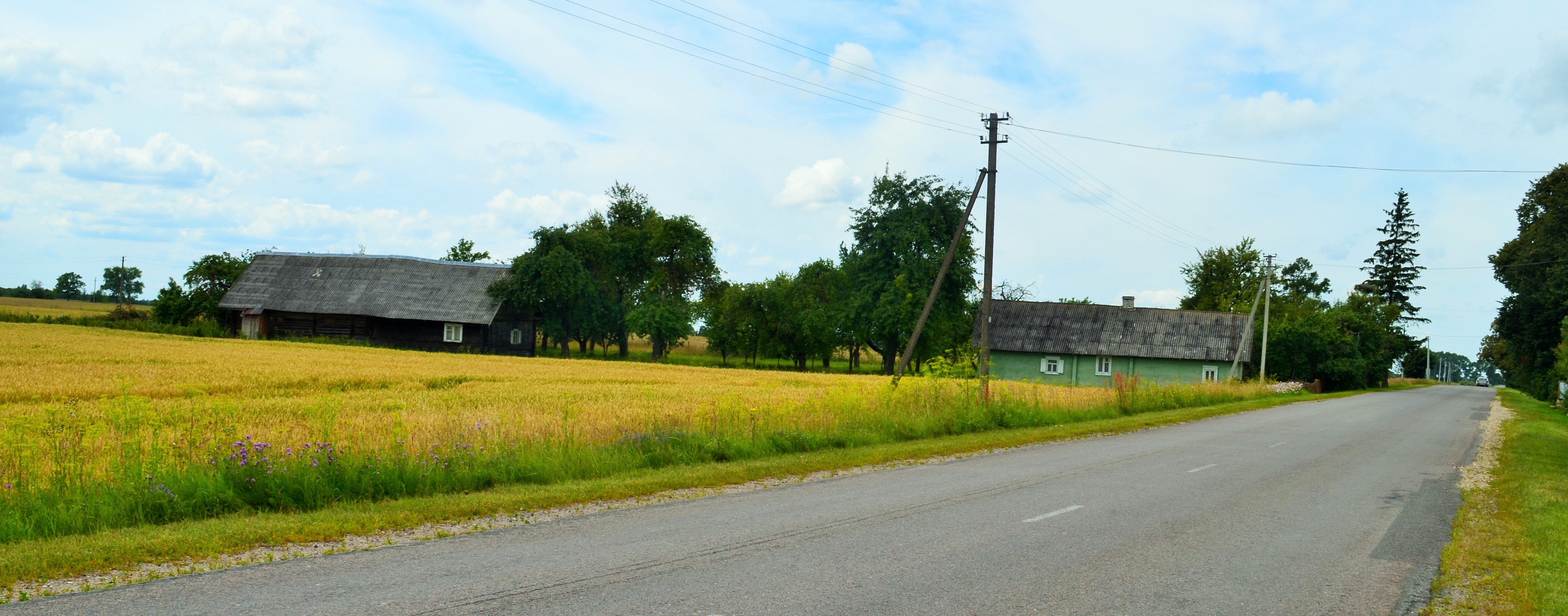 Jurginai, Ukmergės raj.